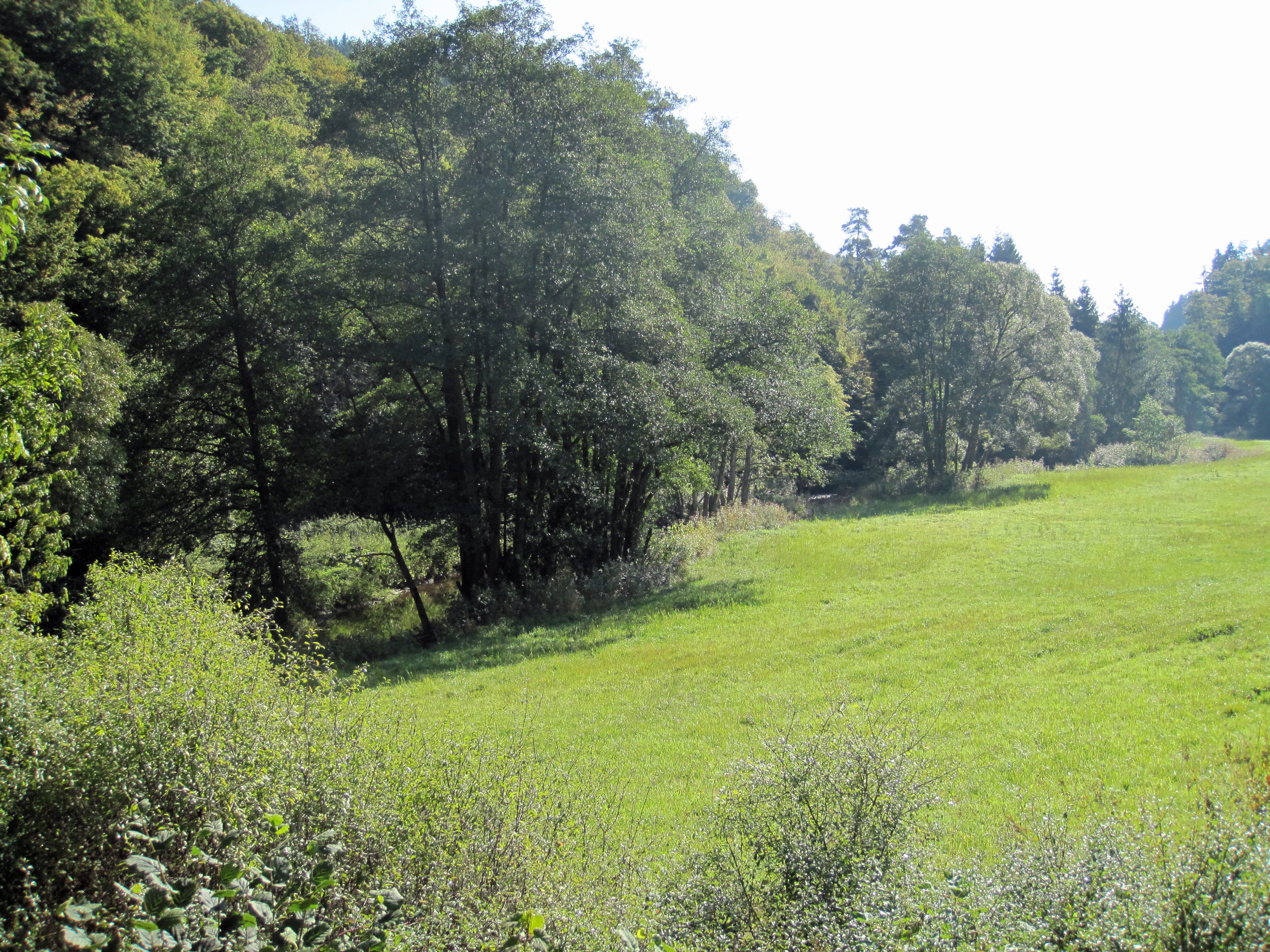 Tal der Kleinen Kyll südlich der Mündung Meerbach